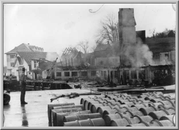 Dette bildet er i eie av min familie, og derfor opphever jeg opphavsretter ved å legge det ut.